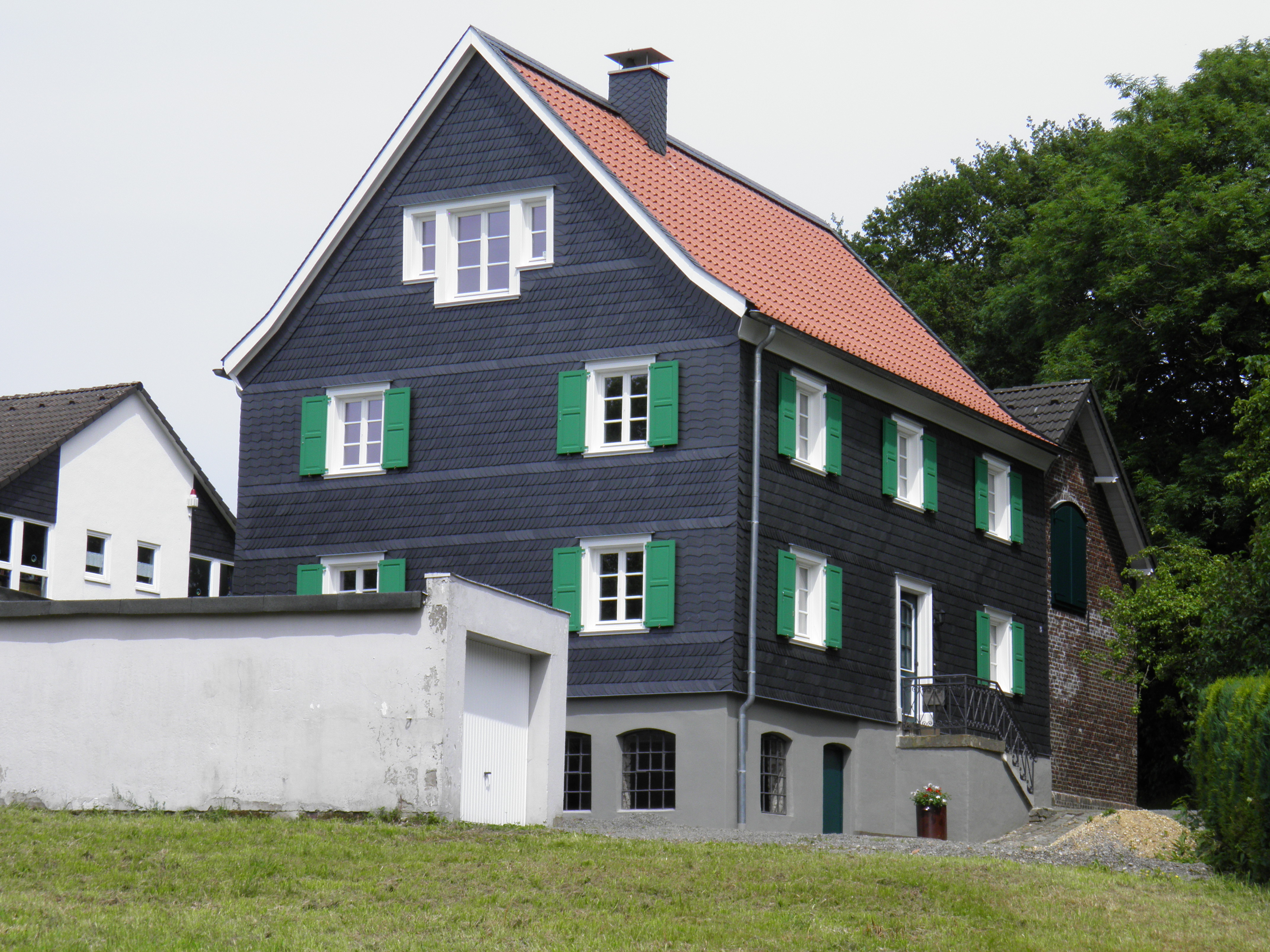 Hohenhagen Hof